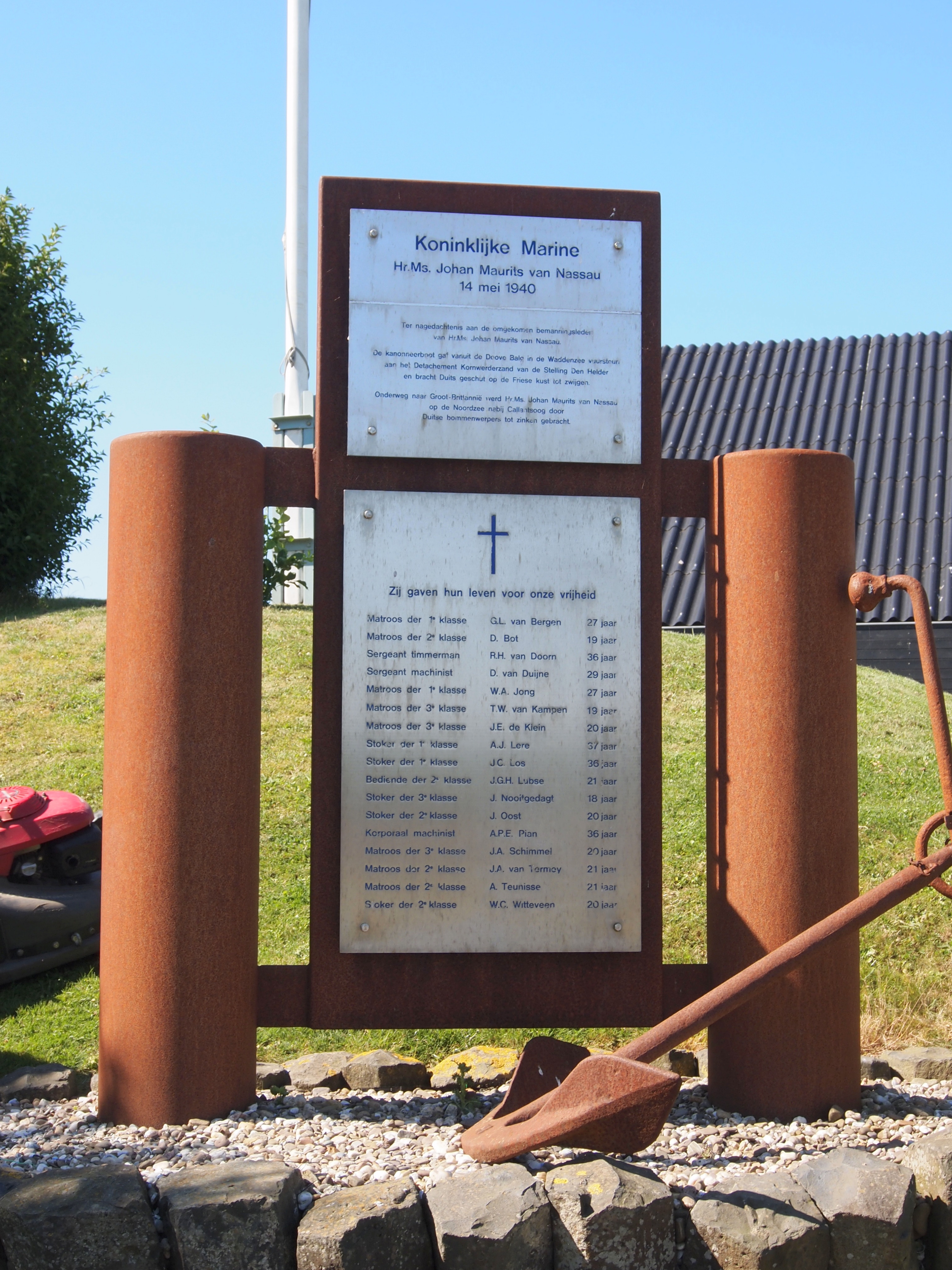 Kazemattenmuseum Kornwerderzand - Monument voor de opvarenden van de Hr.Ms. Johan Maurits van Nassa